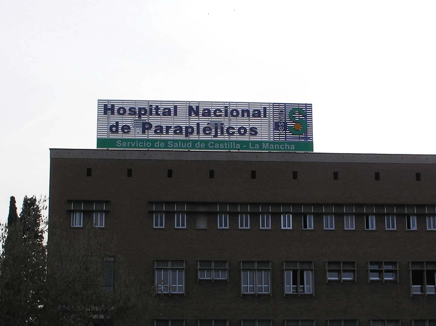 Hospital Nacional de Parapléjicos de Toledo (España) Author: Mr. Tickle Date: March 16th, 2006 Place: Toledo, Spain